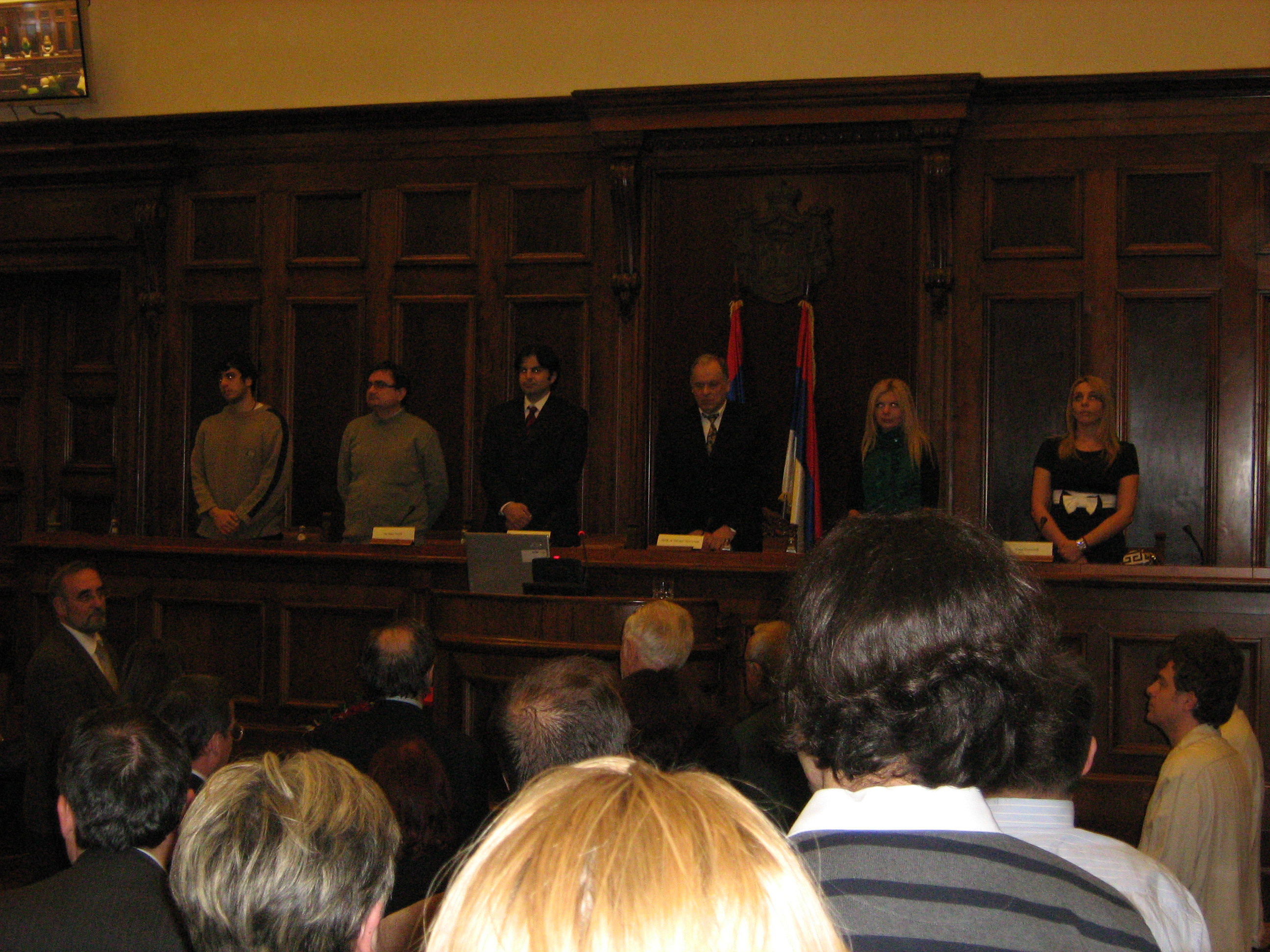 Математички факултет Универзитета у Београду слави Дан факултета у сали Скупштине, 2008.